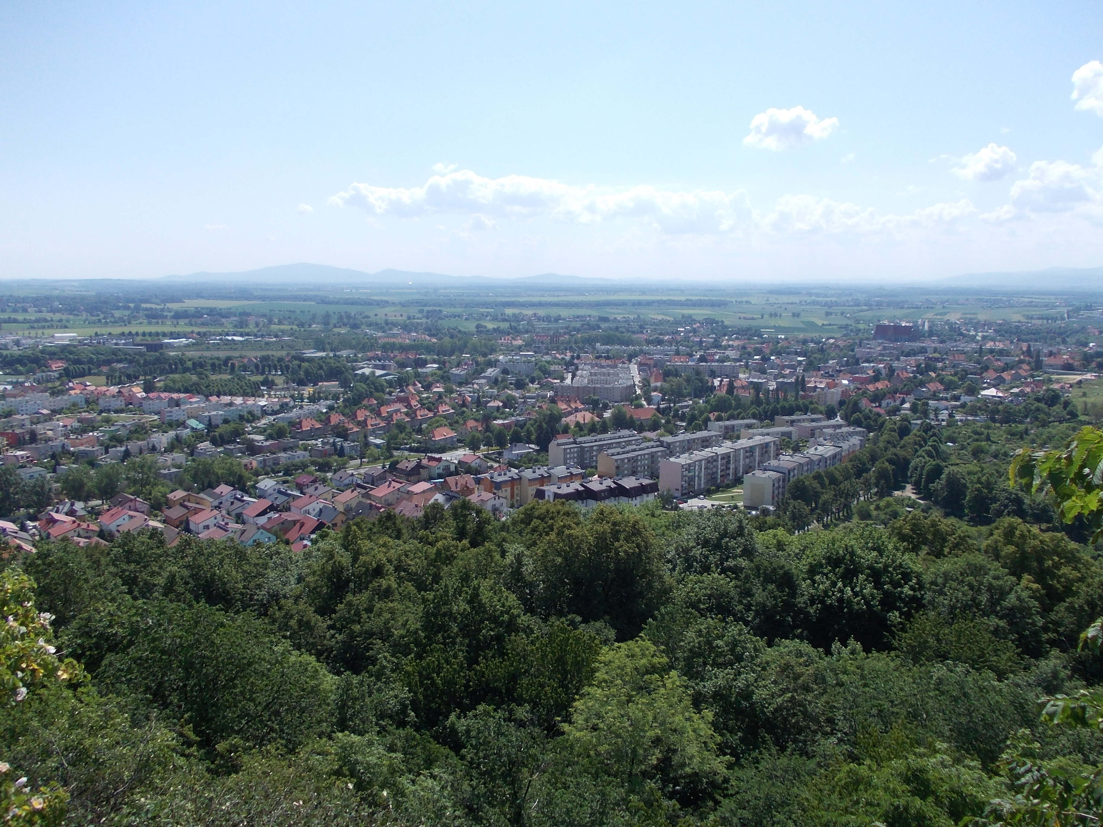 Město Strzegom, celkový pohled od severozápadu